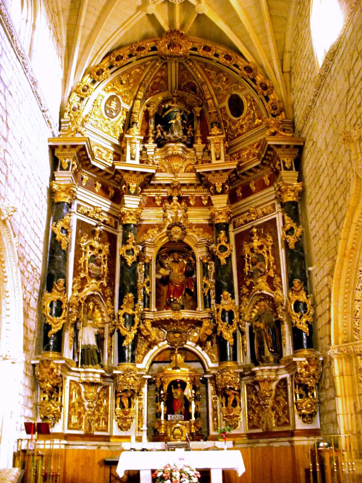 Iglesia de San Andrés (Presencio, Burgos)